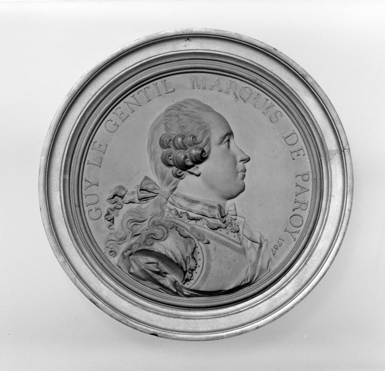 French, Chaumont-sur-Loire; Medallion; Sculpture-Miniature